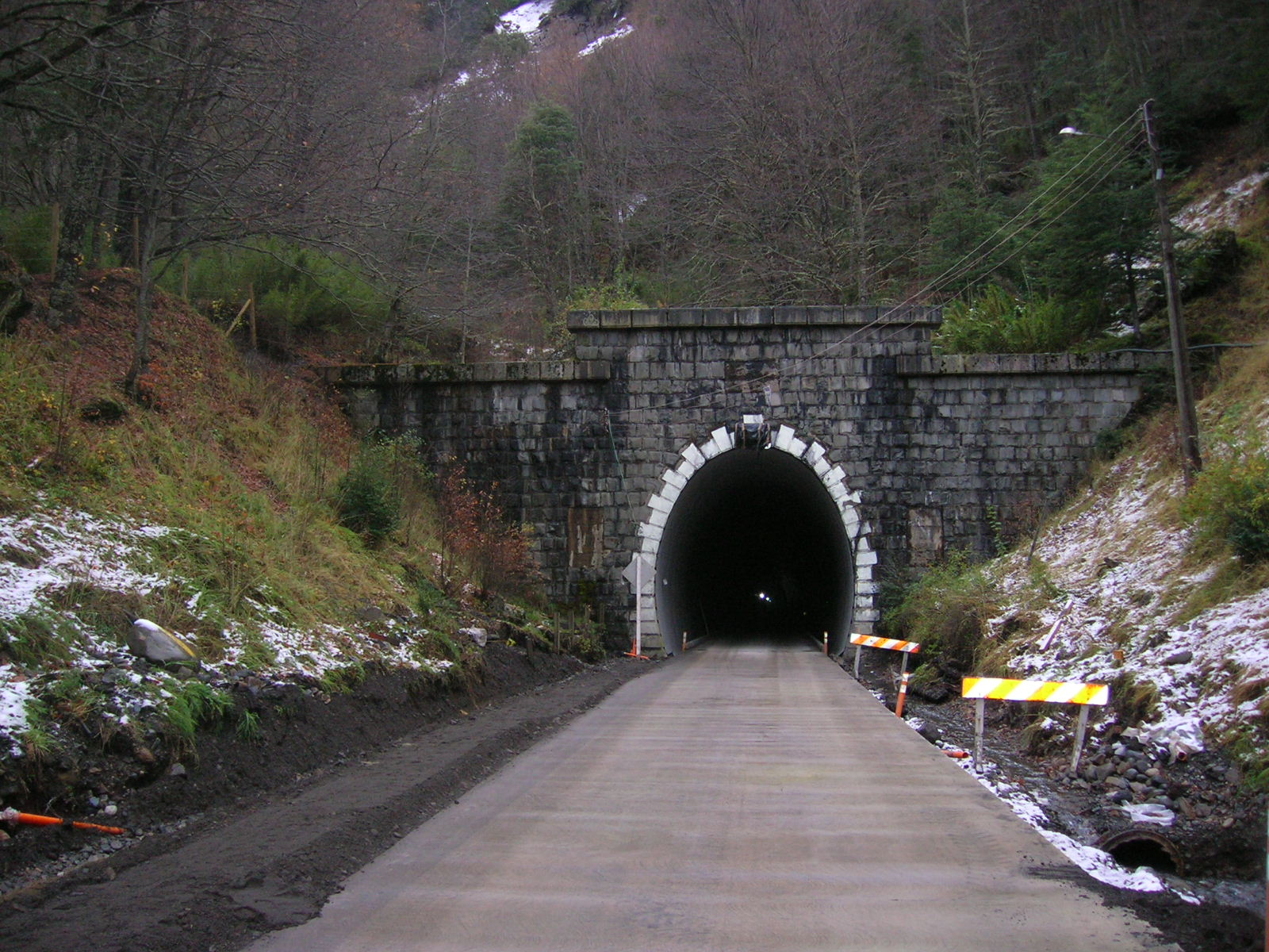 Entrada Oeste Túnel Las Raíces